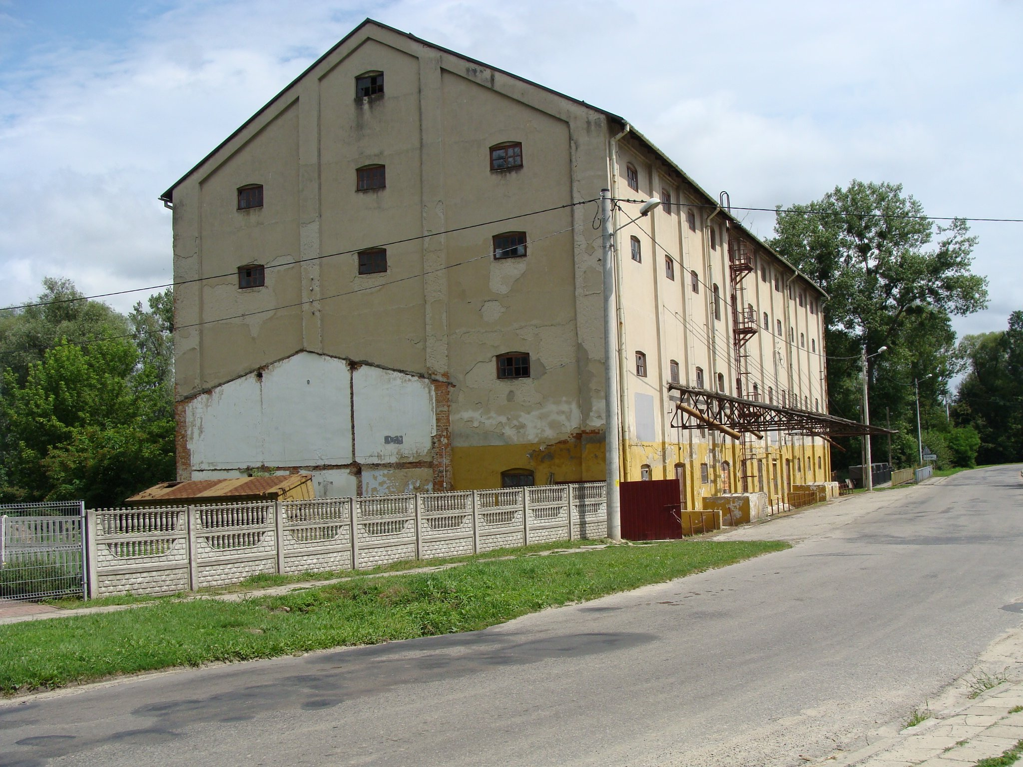 Tarnogóra - młyn wodny na Młynówce (odnodze Wieprza)